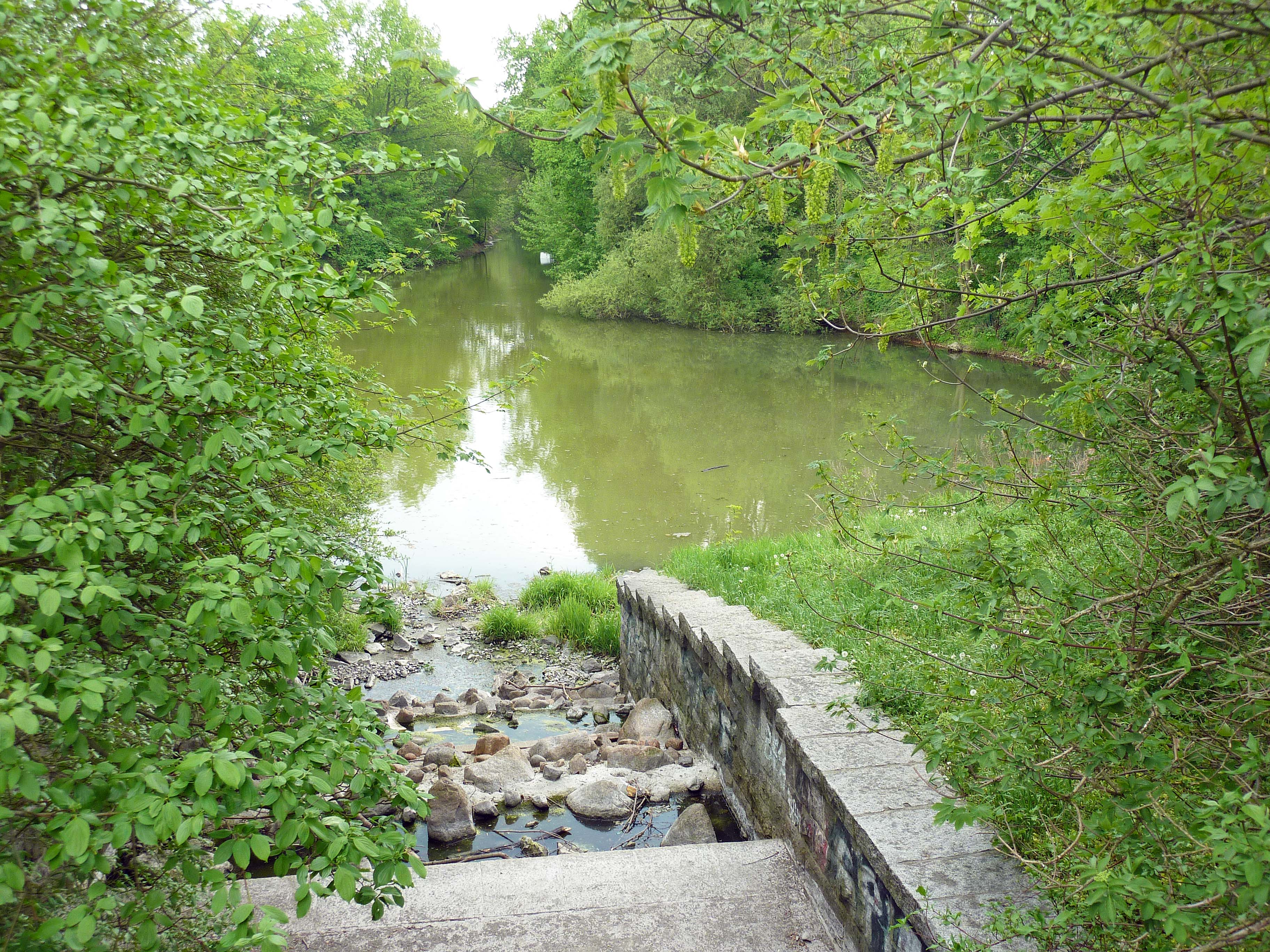 Wuhleblase in Berlin-Biesdorf; Blick nach Süden